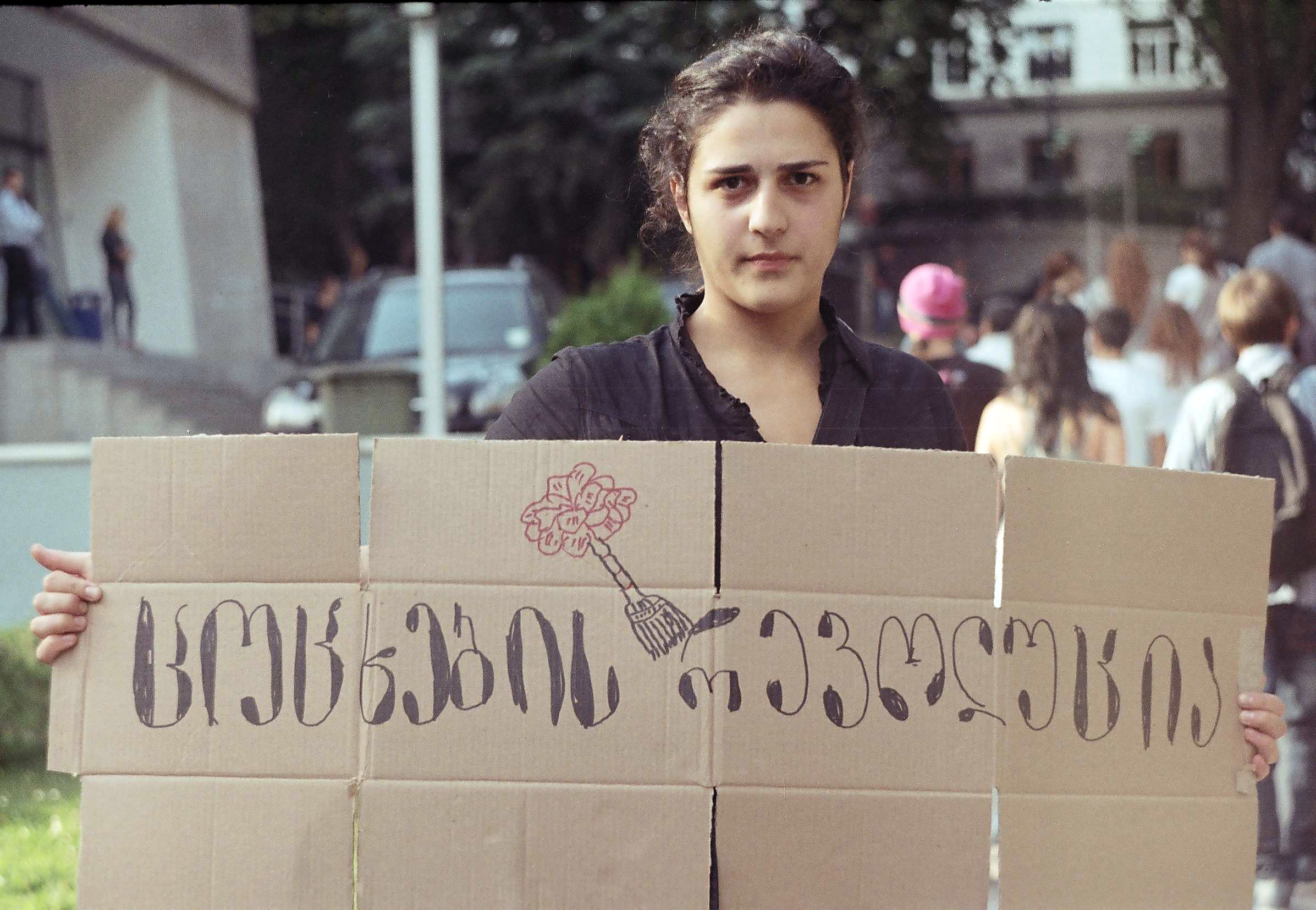 r002-007